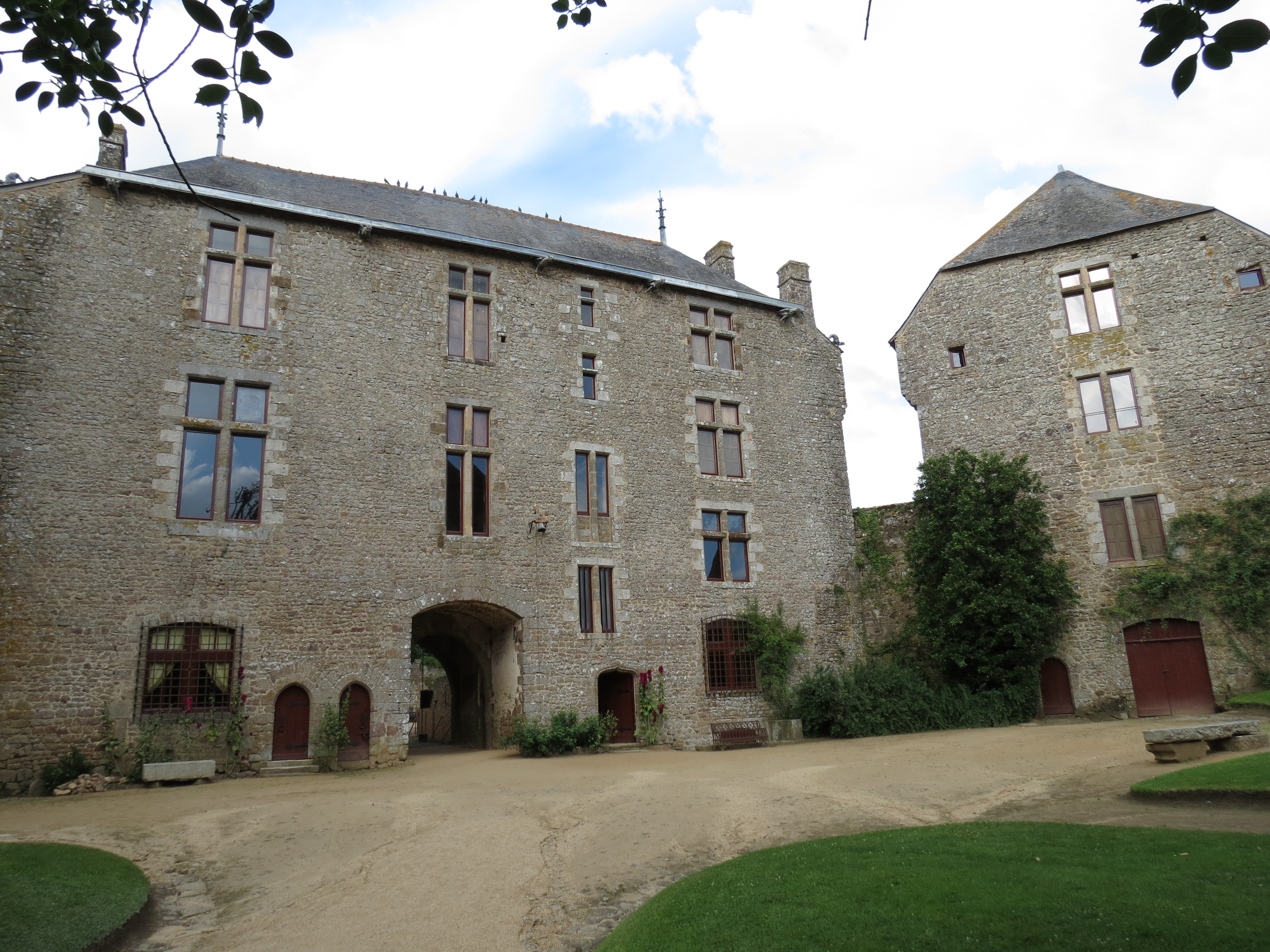 Château de Lassay, dans la Mayenne, Pays de la Loire. Object location48° 26′ 20″ N, 0° 30′ 00″ W